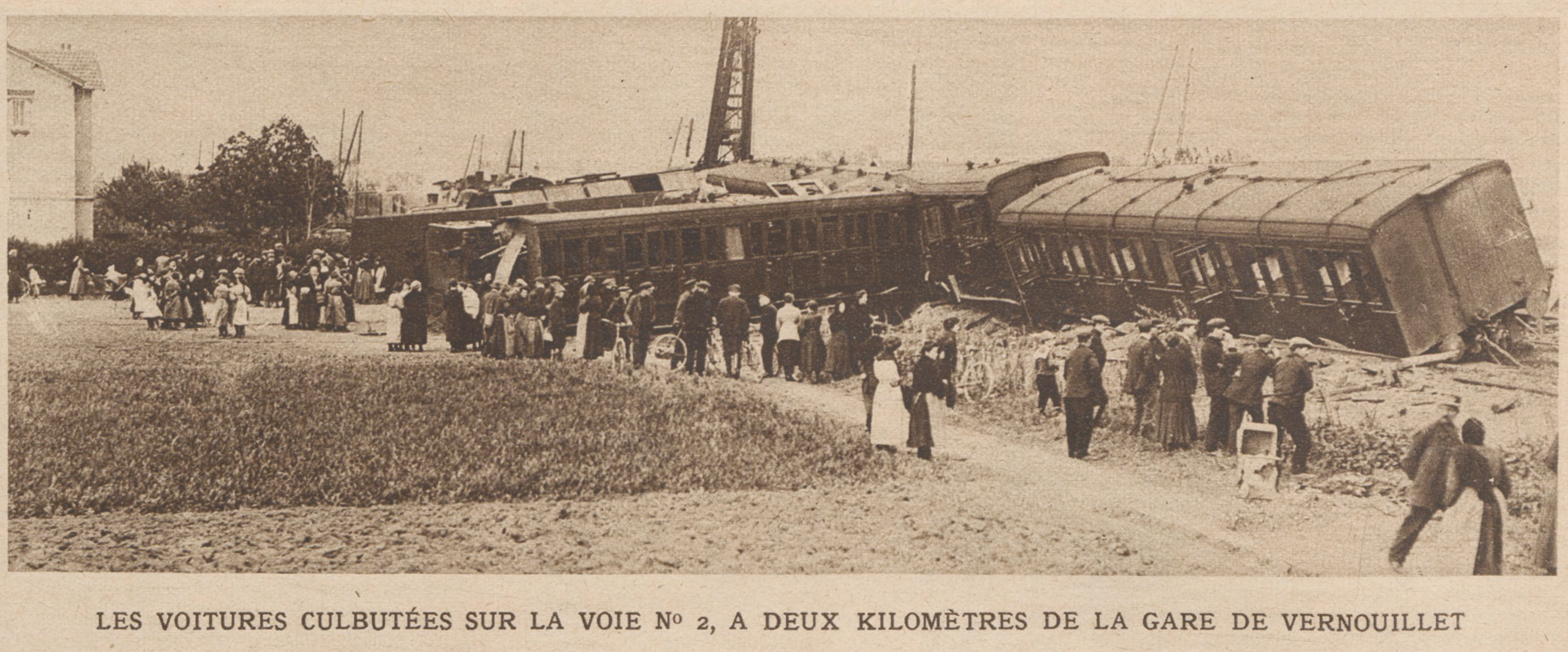 Les voitures déraillées de l'express de Cherbourg